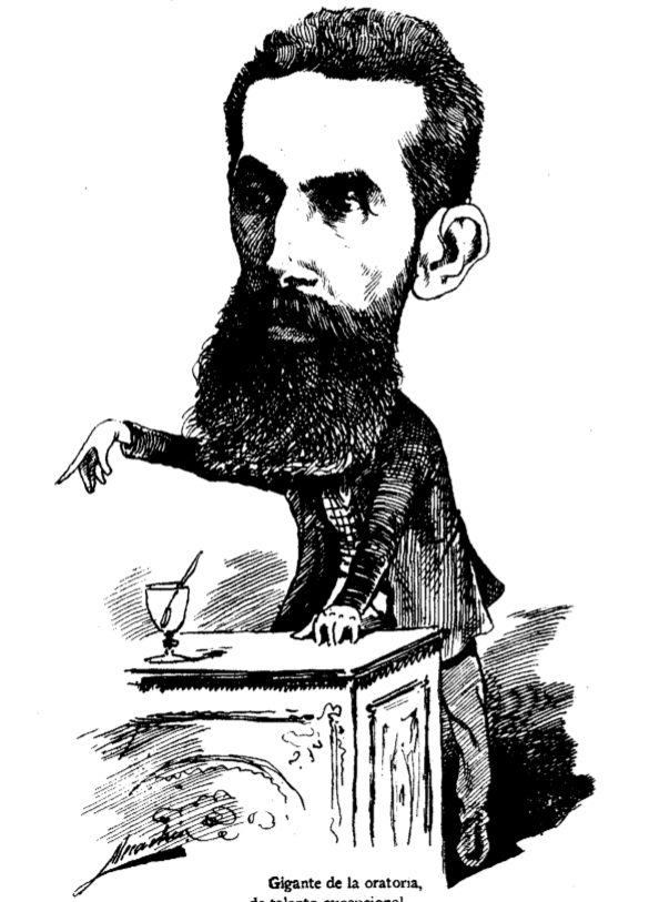 Caricatura de Félix de Aramburu, publicada en la revista española Madrid Cómico.